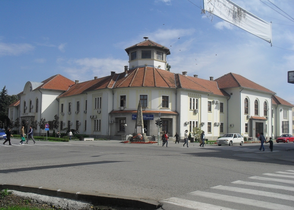 Зграда општине Богатић, Мачва, Србија.